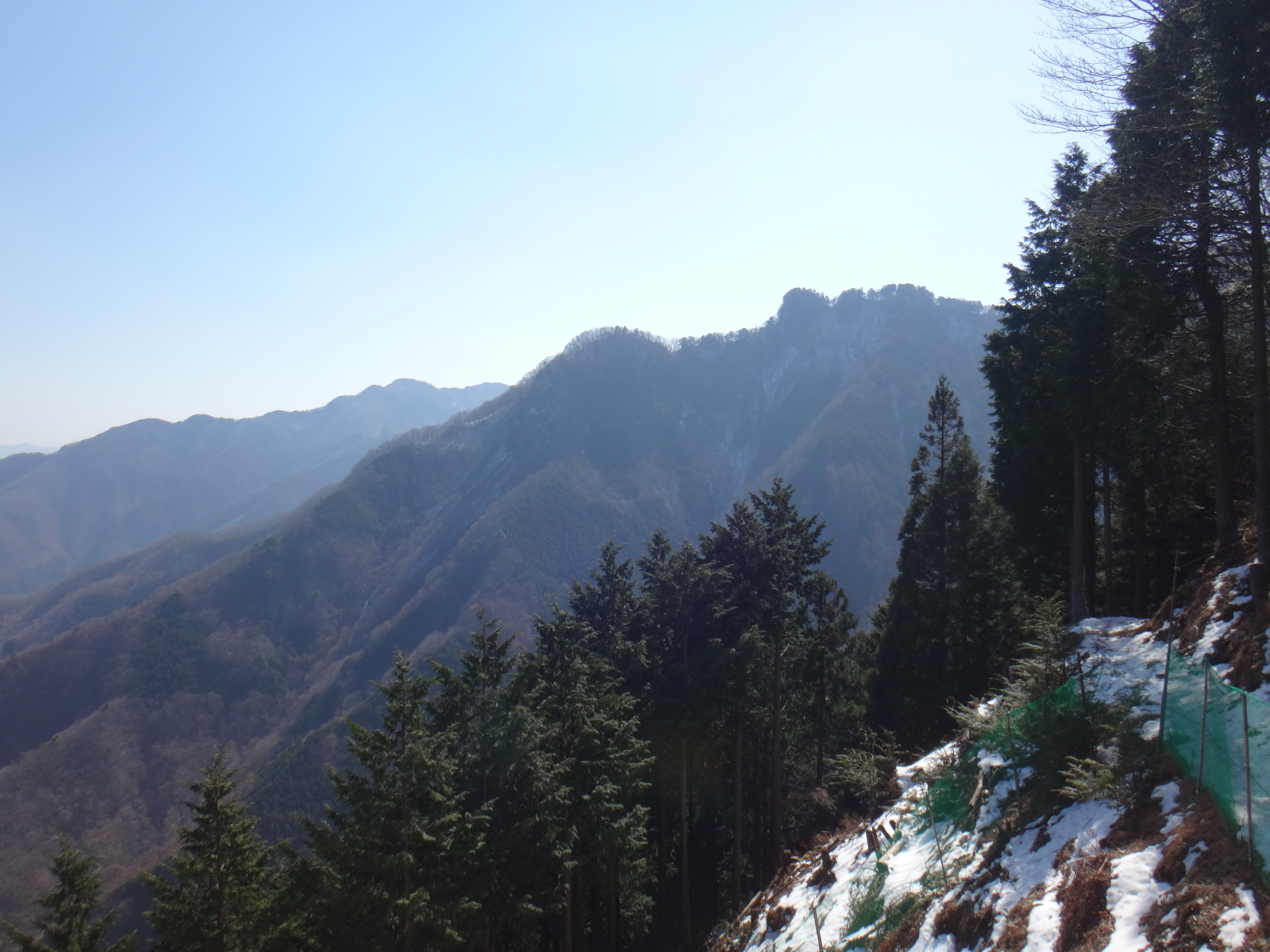 三峯神社の奥宮遥拝殿からの妙法が岳